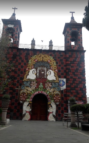 Iglesia Católica de San Mateo Ixtacalco ubicada en el centro de esta comunidad